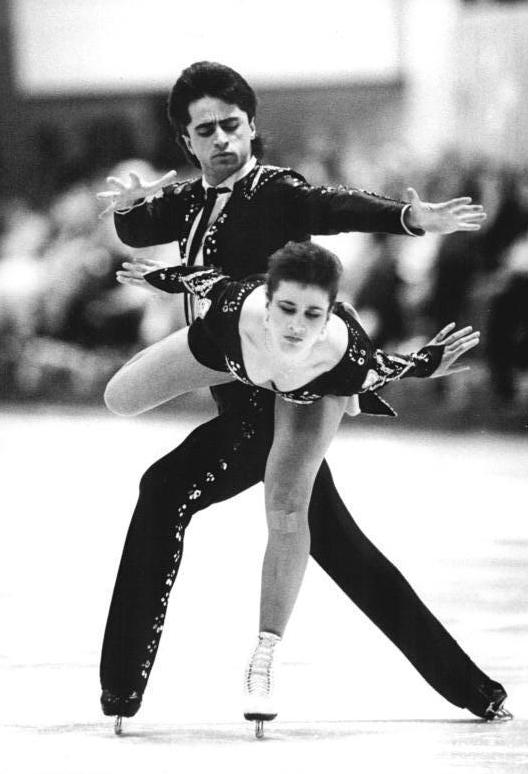 Isabelle Duchesnay, Paul Duchesnay ADN-ZB Settnik 6.4.89 Berlin: ISU-Weltschaulaufen- Das extravagante Geschwisterpaar Isabelle und Paul Duchesnay aus Frankreich begeisterte über 4000 Zuschauer in der Werner-Seelenbinder-Halle. Die Dritten im Eistanz bei den Welttitelkämpfen 1989 in Paris stellten sich einem sachkundigem Publikum mit einem Querschnitt ihres Können. Auf der zwölften Station der traditionellen Tournee der Internationalen Eislauf-Föderation (ISU) zogen die 26 Akteure in einem bunten Programm noch einmal alle Register ihres Könnens.